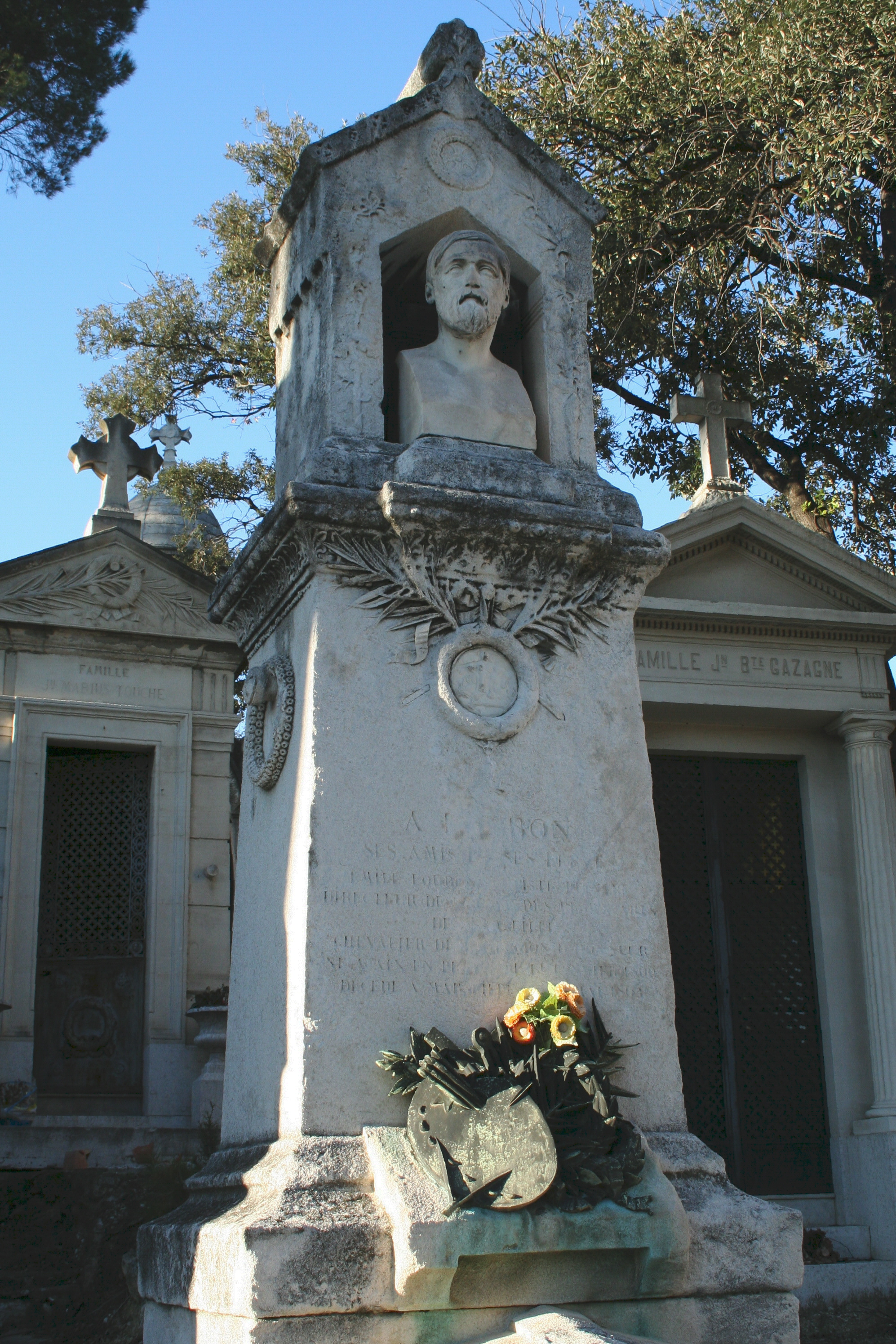 Tombe du peintre émile Loubon au cimetière Saint-Pierre à Marseille effectué par Marius Guindon (1831-1918).